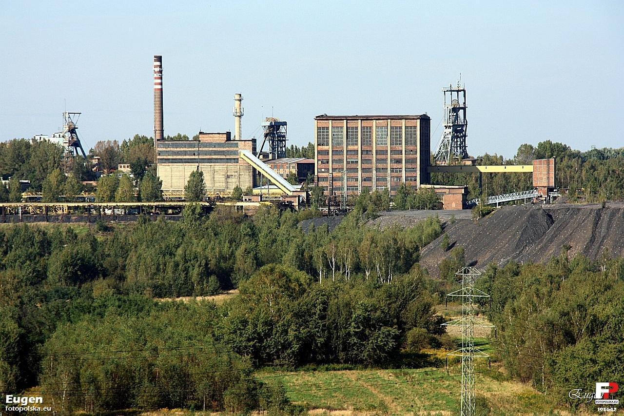 Widok na kopalnię Halemba -Wirek Ruch Wirek ( "Nowy Wirek")